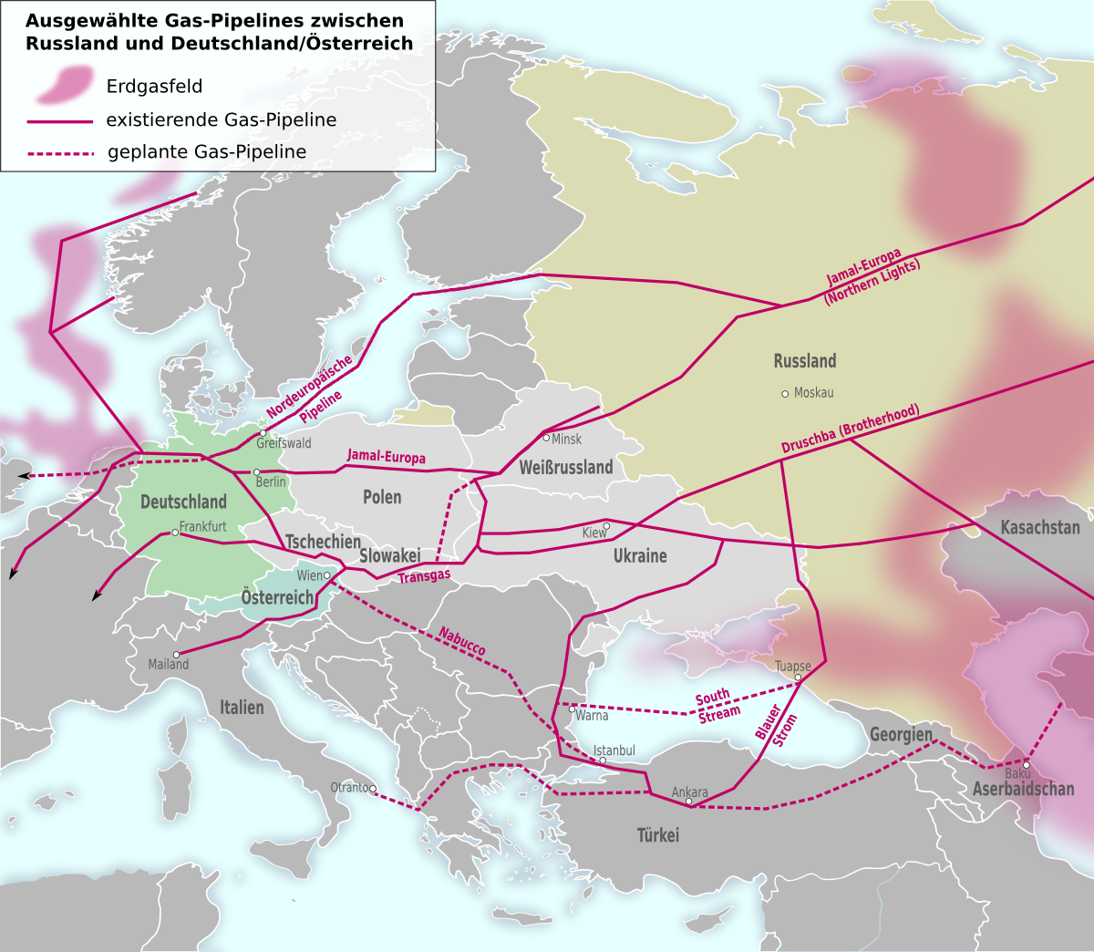 Vorhandene und geplante Gas-Pipelines zwischen Russland und Deutschland (Quelle: EIA [1])